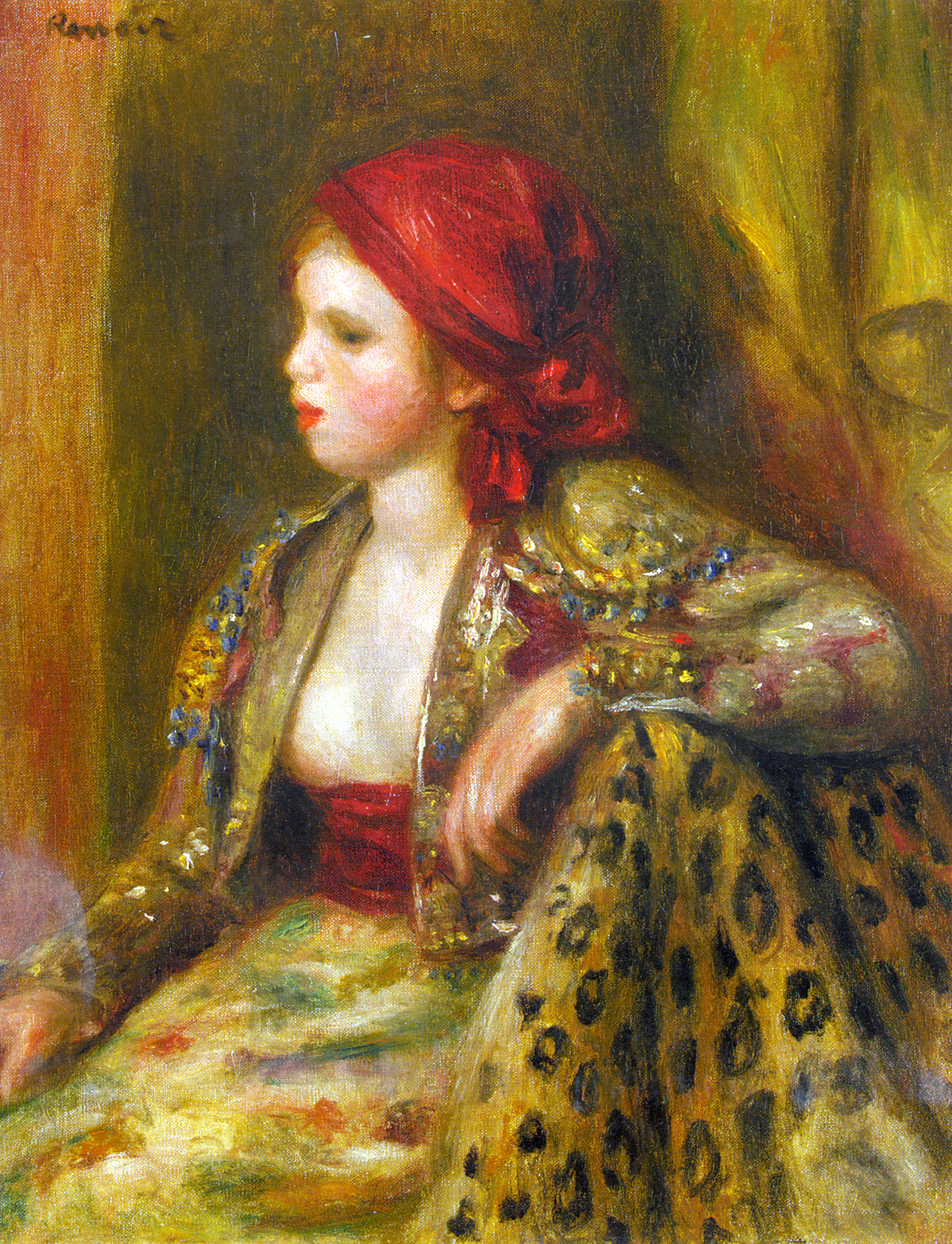 "Odalisque" by Pierre-Auguste Renoir